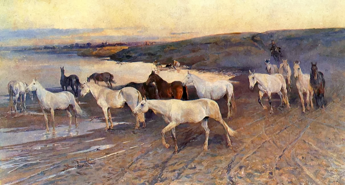 Н.С. Самокиш (1860-1944), Табун маток Ново-Томниковского конного завода (1890) - пункт 3 Категория:Изобразительное искусство России